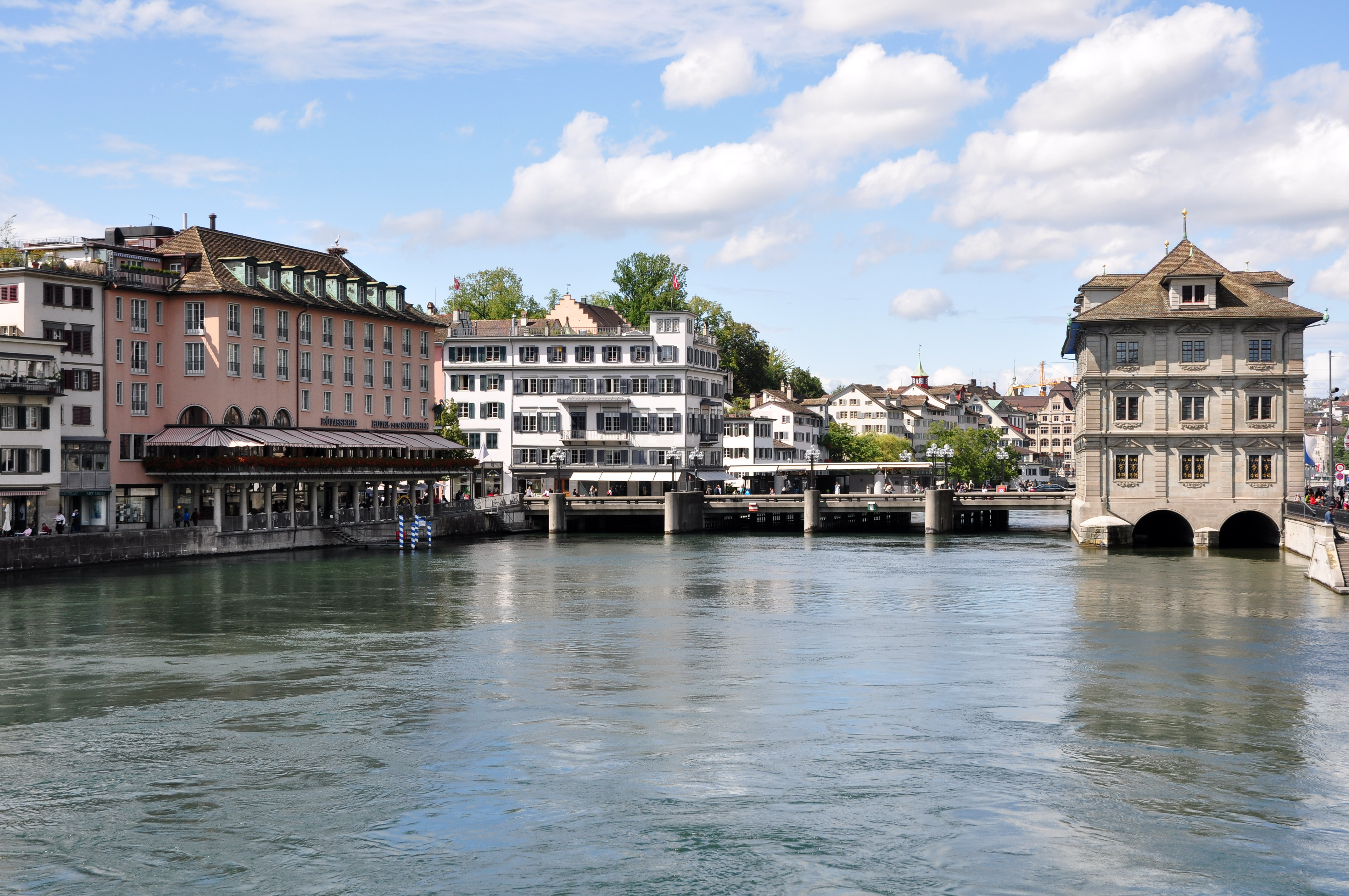 Rathausbrücke (Gmüesbrugg) and Limmat river in Zürich (Switzerland), as seen from Münsterbrücke, and (from the left:) Hotel zum Storchen, Haus zum Schwert and Rathaus at Limmatquai, Schipfe and Lindenhof hill in the background.